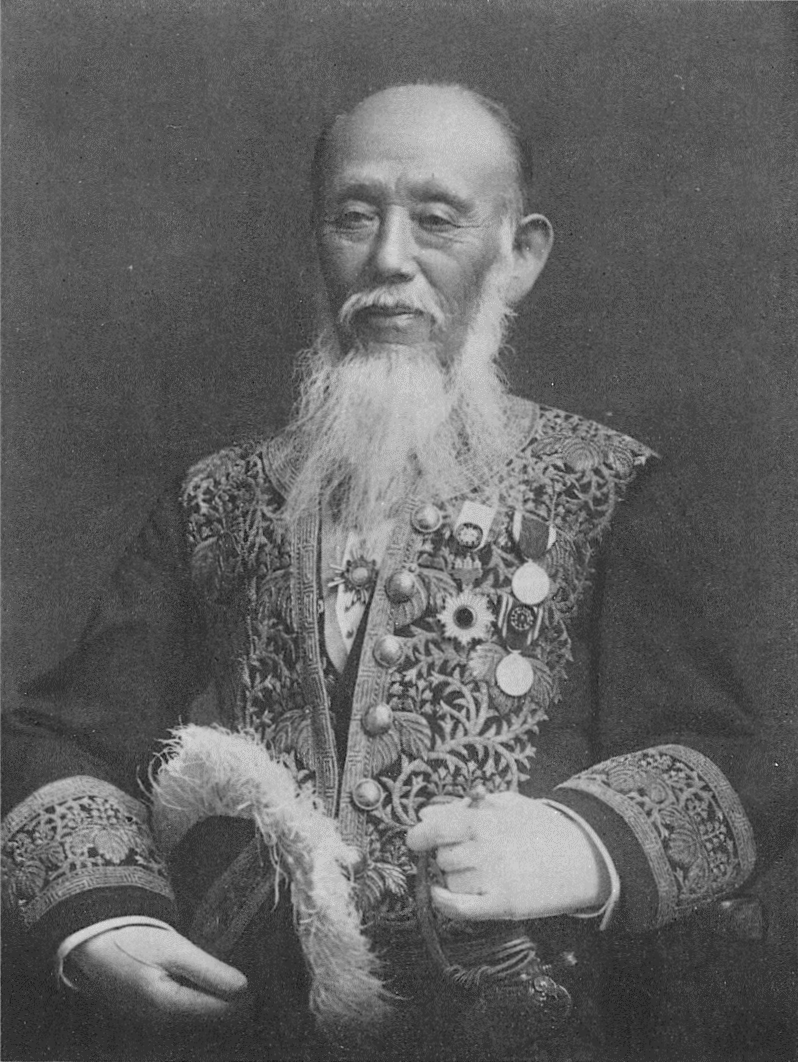 Portrait of Kojima Iken (児島惟謙, 1837 – 1908)